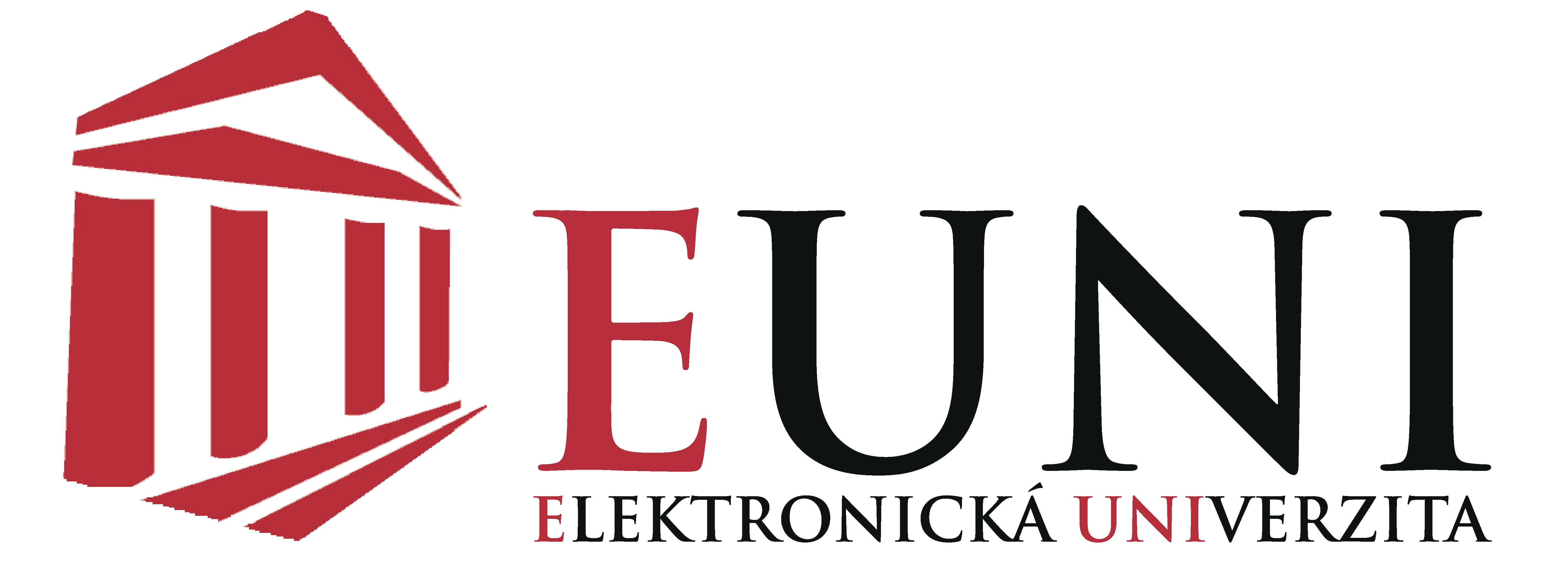 logo portálu Elektoronické univerzity EUNI.cz